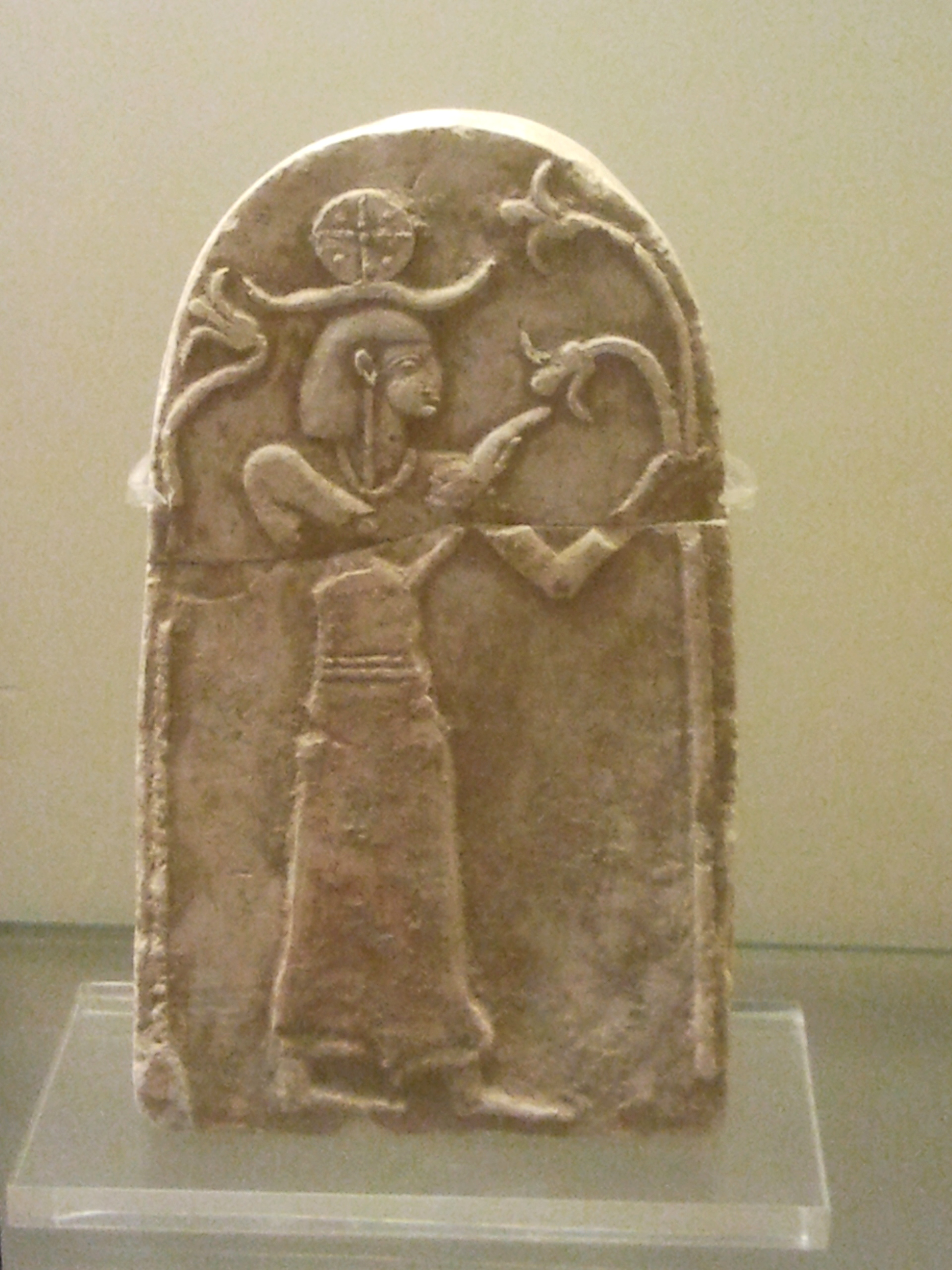 אסטלה מתל בית מירסים בחבל לכיש, דמות אלה ניצבת לובשת שמלה ארוכה ולראשה גלגל השמש ידה מורמת בתנועת ברכה ,מוזיאון הכט חיפה. לפרחי השושן